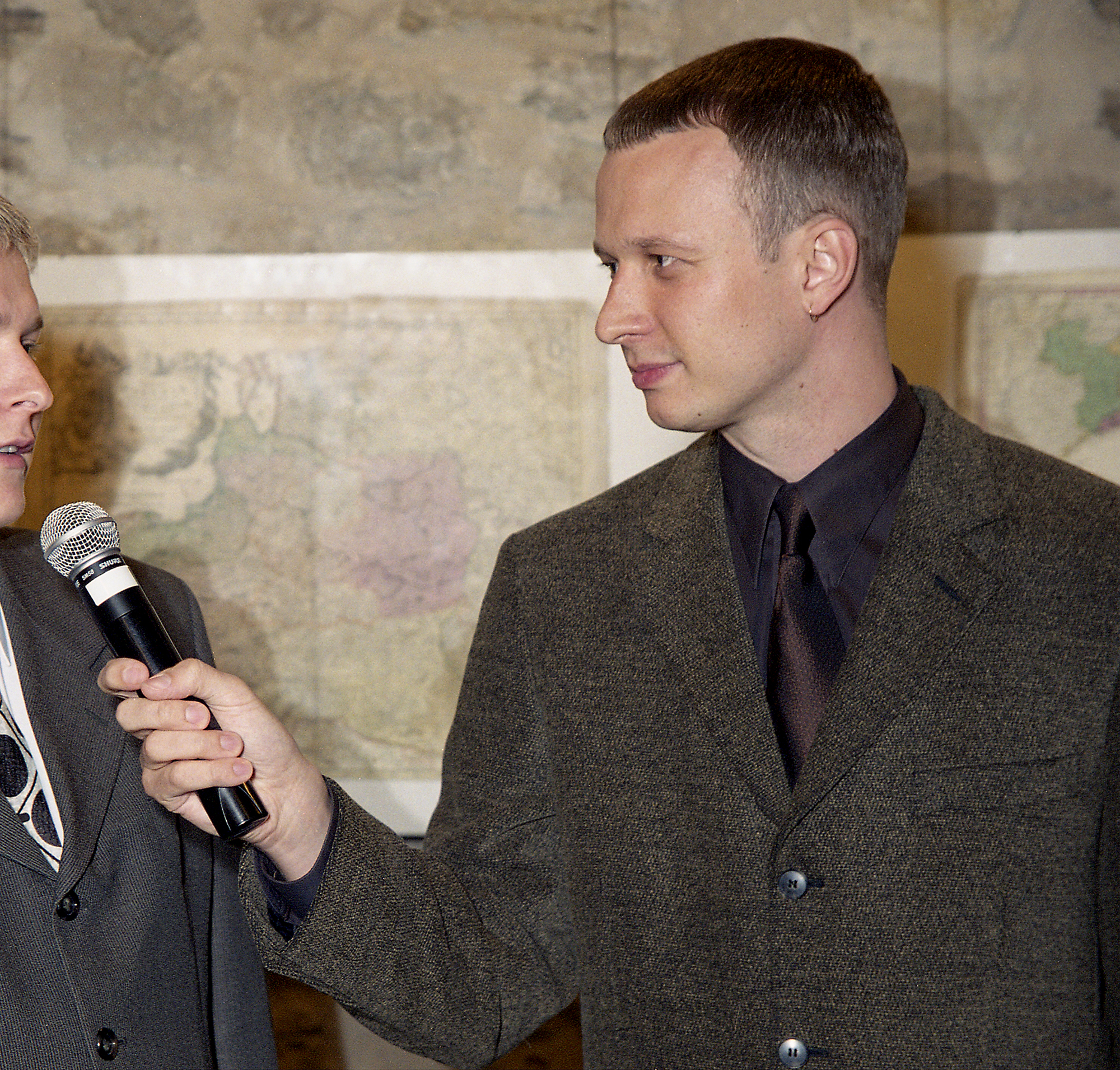 Marko Reikop, tele- ja raadioajakirjanik 2000